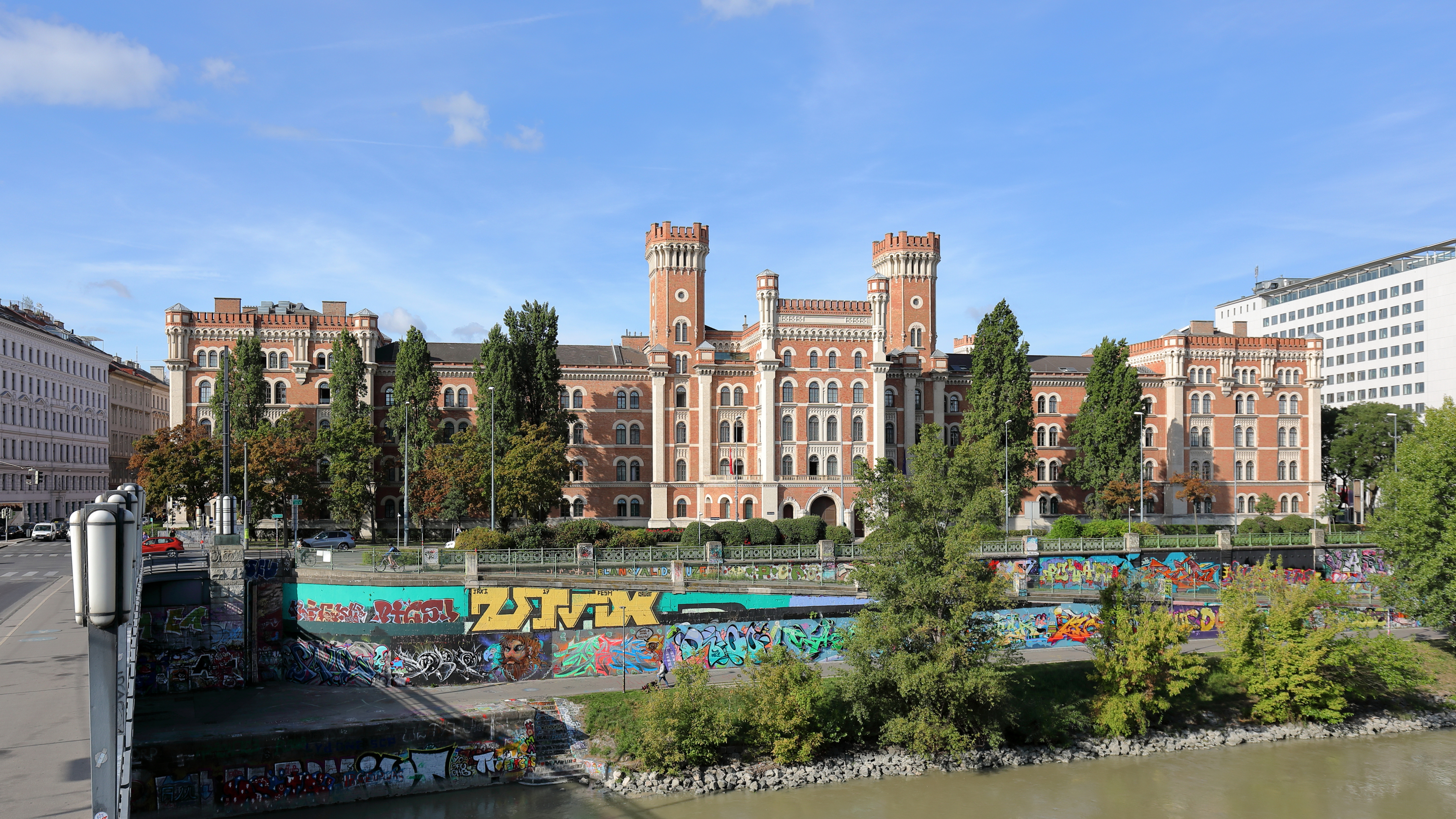 Ostansicht der Rossauer-Kaserne im 9. Wiener Gemeindebezirk Alsergrund. Das Gebäude im Windsor-Stil (veralteter Nachläufer des romantischen Historismus) wurde ab 1865 nach Plänen des Obersten des Geniestabs Karl Pilhal und des Majors Karl Markl errichtet und am 17. August 1870 als Kronprinz-Rudolph-Kaserne der Benützung übergeben. Als „Defensivkaserne" hat sie einen festungsartigen Charakter. Errichtet wurde sie auf einem 43.293 Quadratmeter großen Grundstück mit einer Länge von 270 Meter und einer Breite von 140 Meter. An der Außenfront gibt es rund 1.300 Fenster.